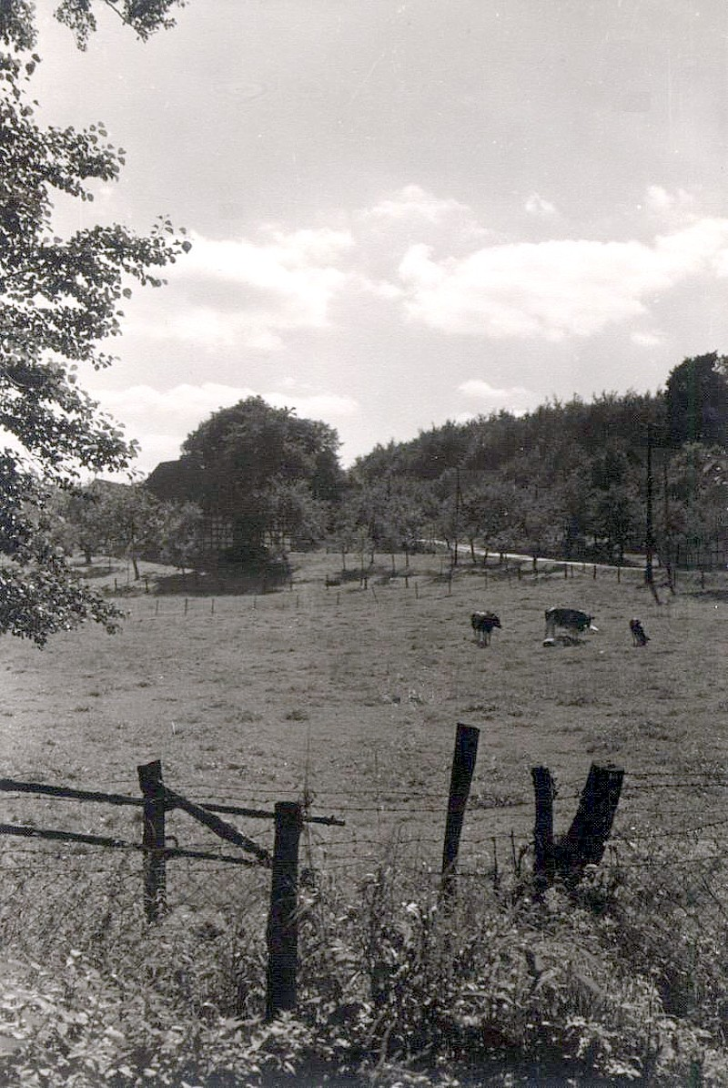 Preußisch Oldendorf: Blick von der Pforte zur Oldendorfer Schweiz an der Hegge über Steinmanns Wiese zur Bergstraße